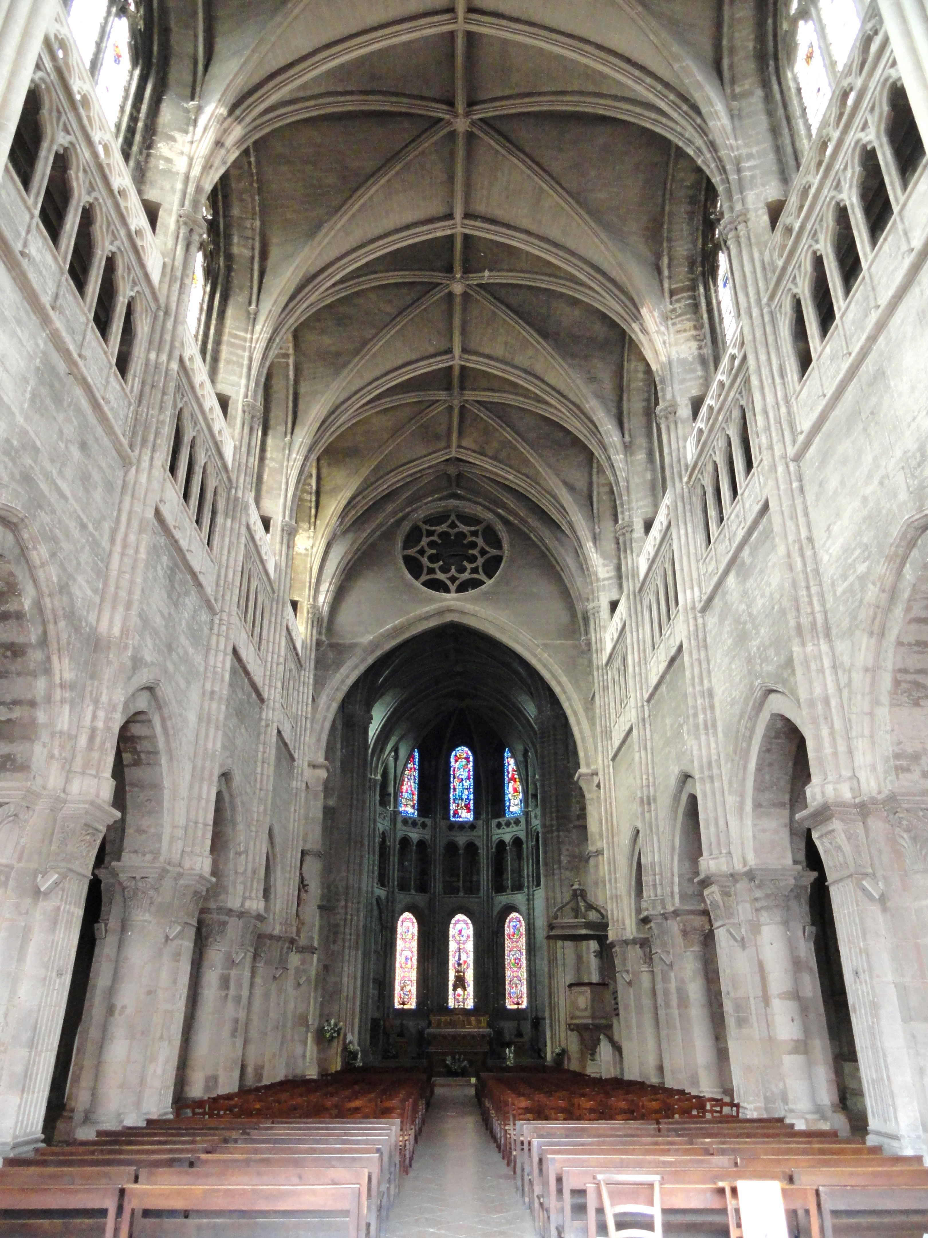 Cathédrale Saint-Vincent de Chalon-sur-Saône, Chalon-sur-Saône, Saône-et-Loire, France.